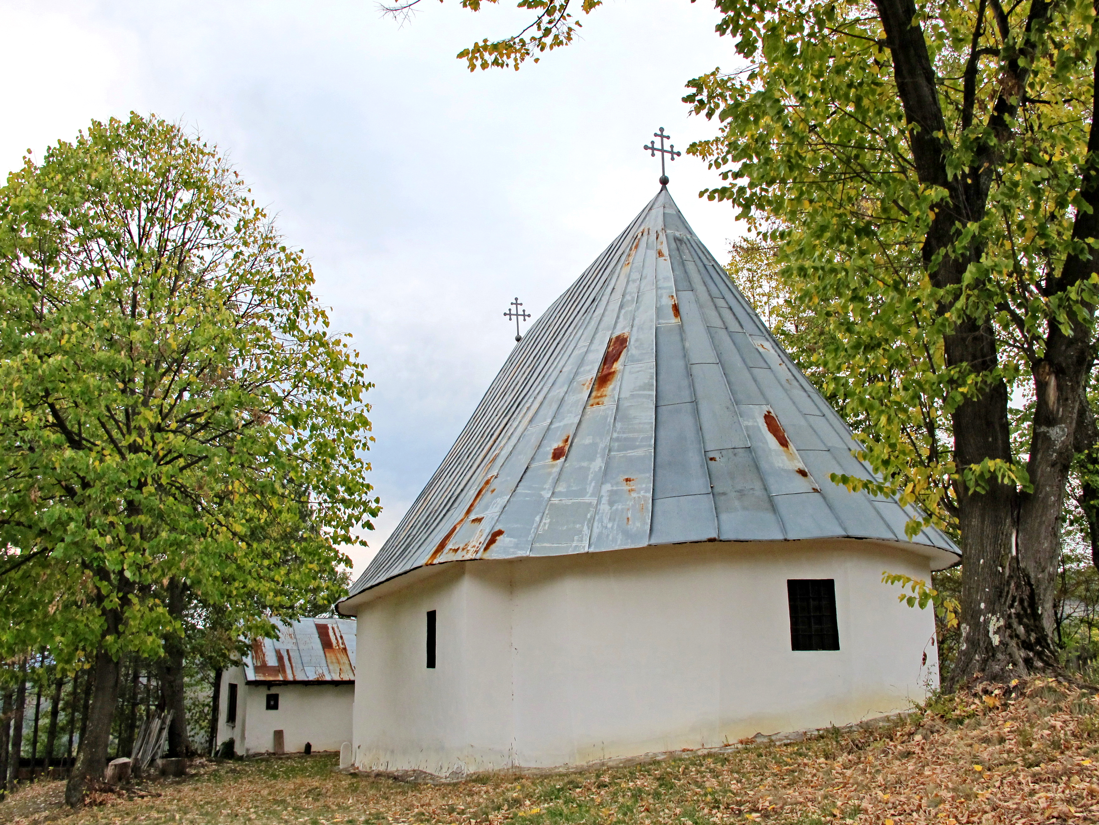 Crkva brvnara u Selencu, Ljubovija, posvecena svetim apostolima Petru i Pavlu. Pretpostavlja se da je podignuta u XIII veku, a obnovljena je 1816. godine.